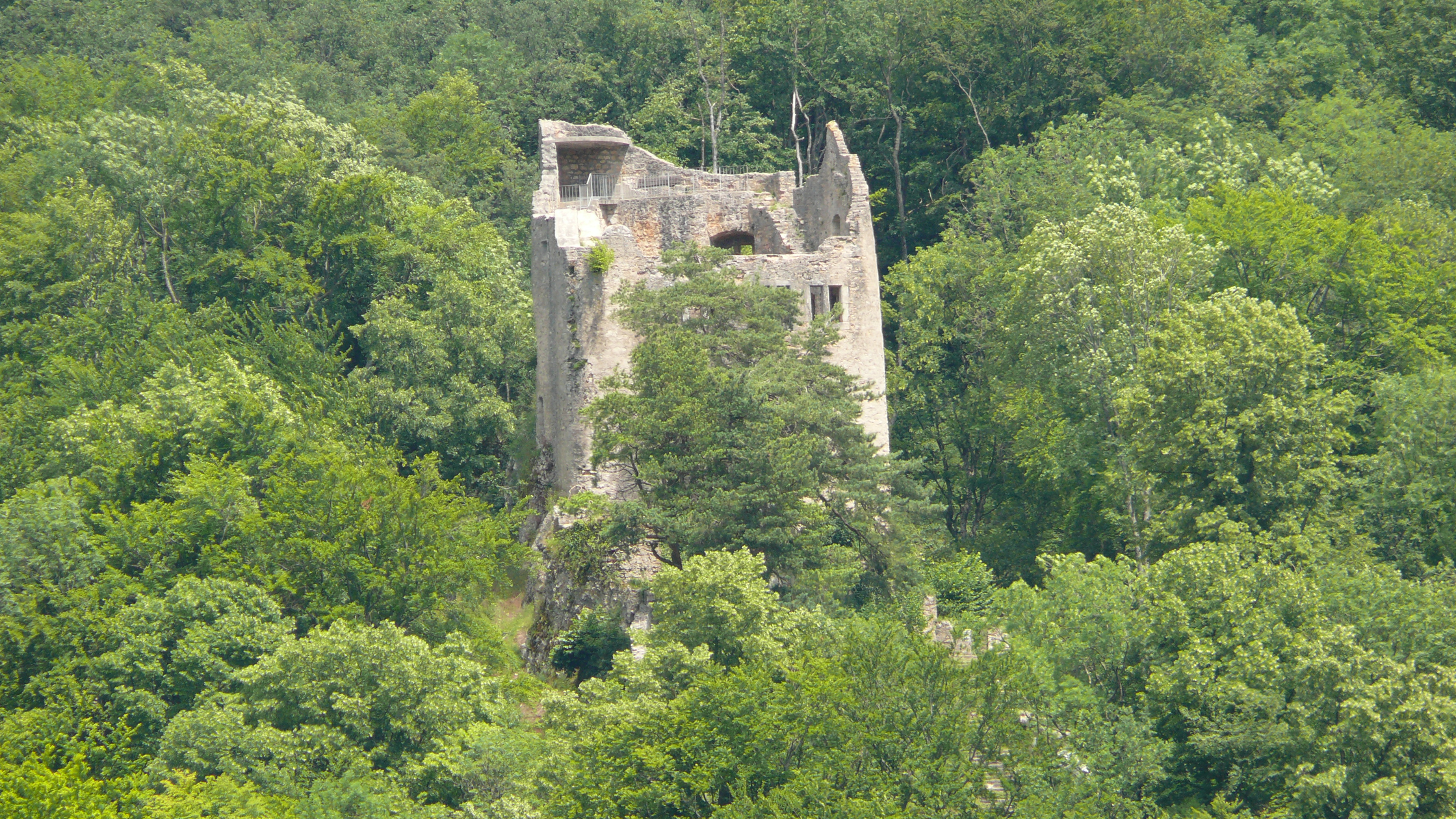 Ruine Homburg, Kanton Basel-Landschaft, Homburgertal, ruin Homburg, switzerland